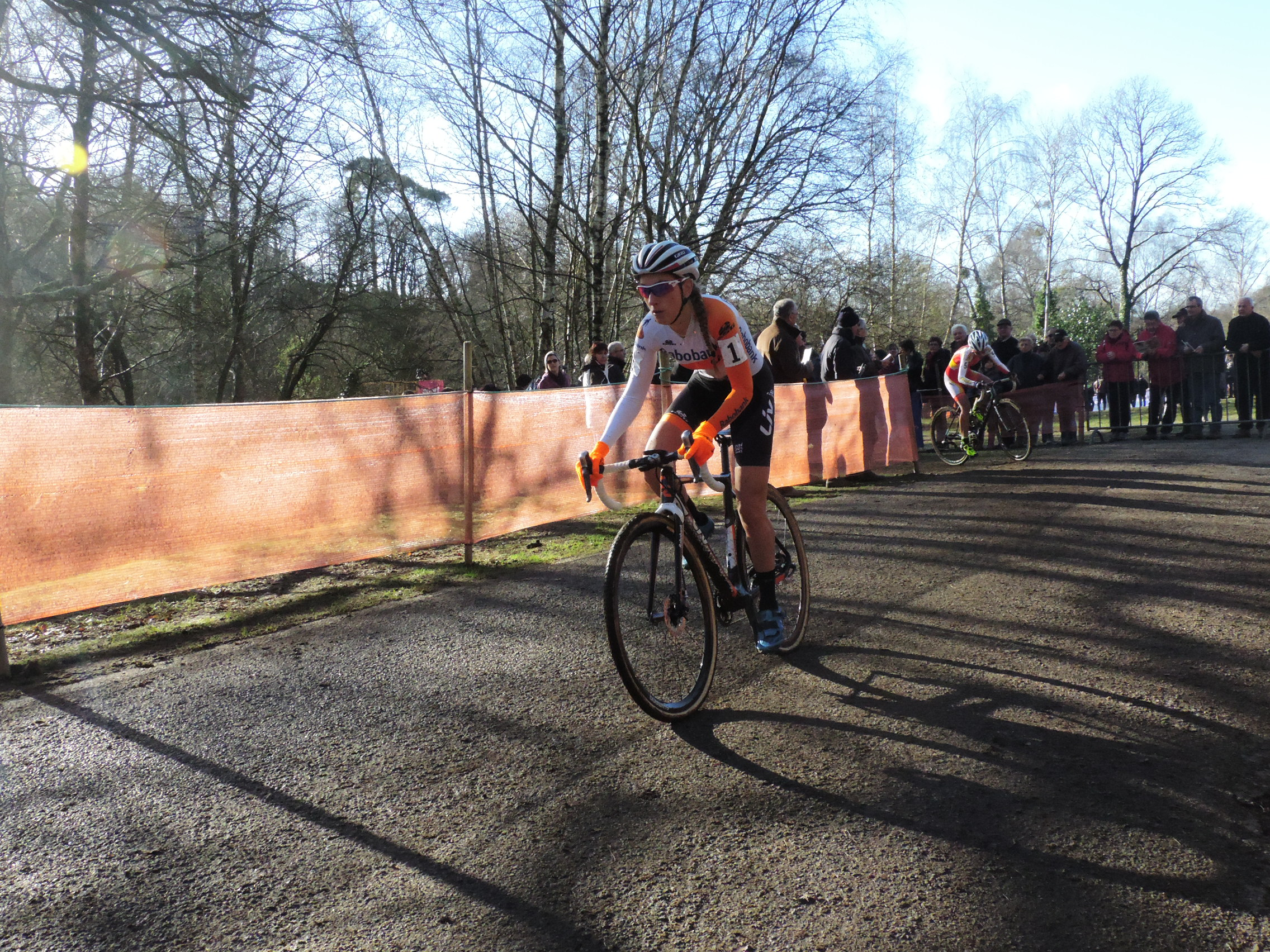 Elle gagnera la course